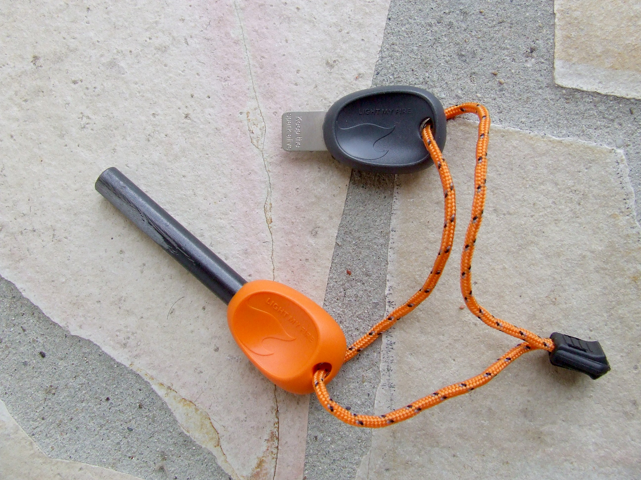 Firesteel de la marque Light My Fire, modèle "army"